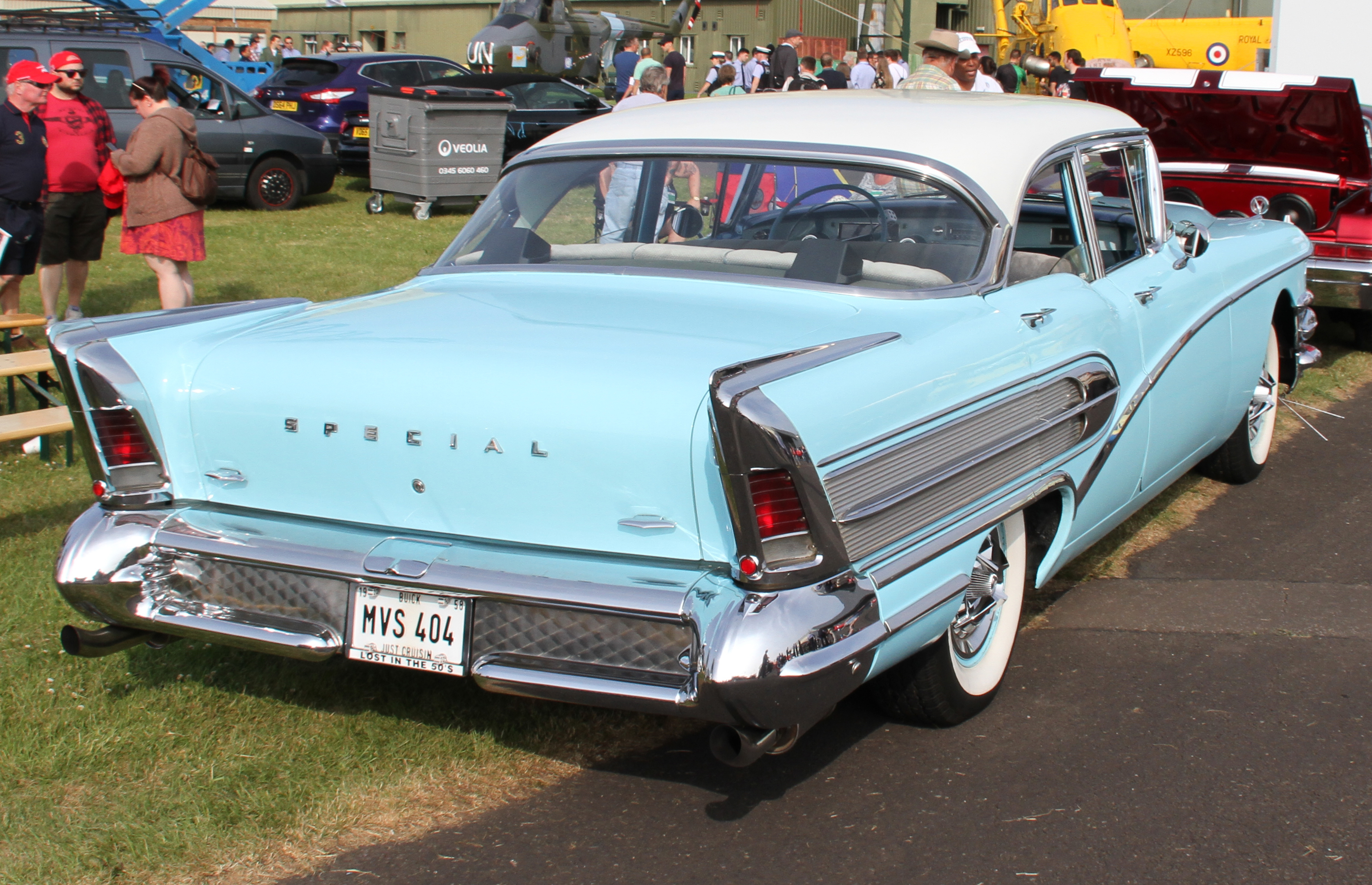 Buick Special rear